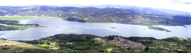 Panoramica de Guatavita